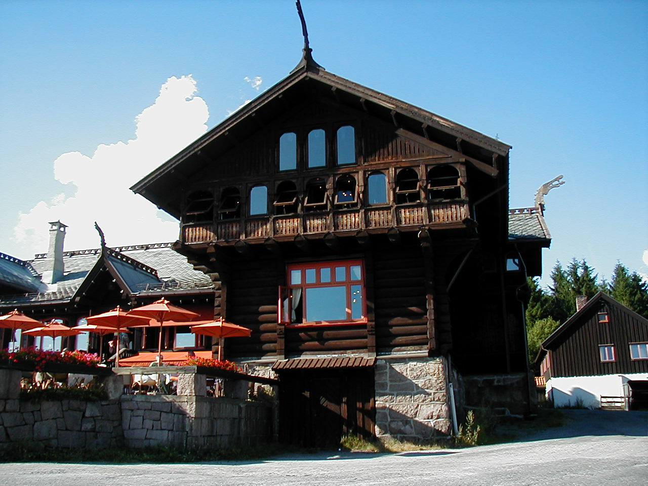 Frognerseteren in Oslo, Norway